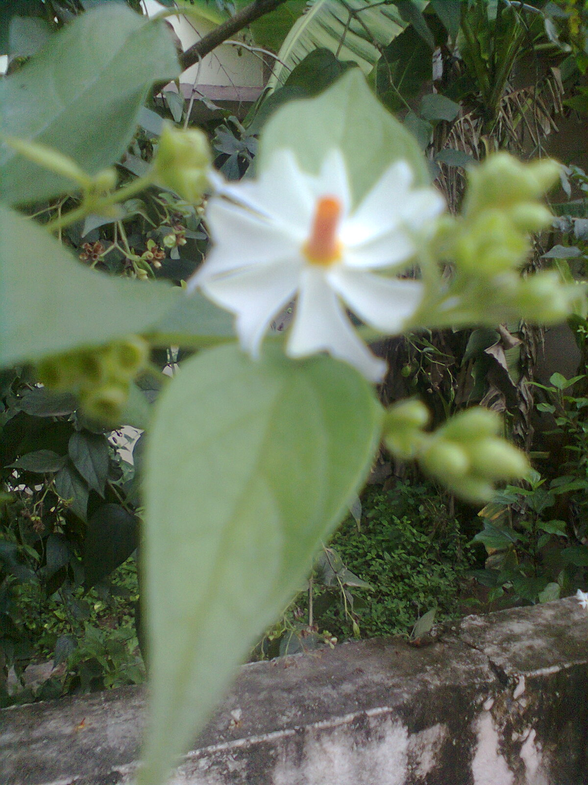 own-shooting image. a kind of jasmine flower, blossoms in the evening and spread fragrant all-over the night, a sangam literature calls it as 'seedal' சேடல், and at present the flower is known as 'paval,malli' பவளமல்லி